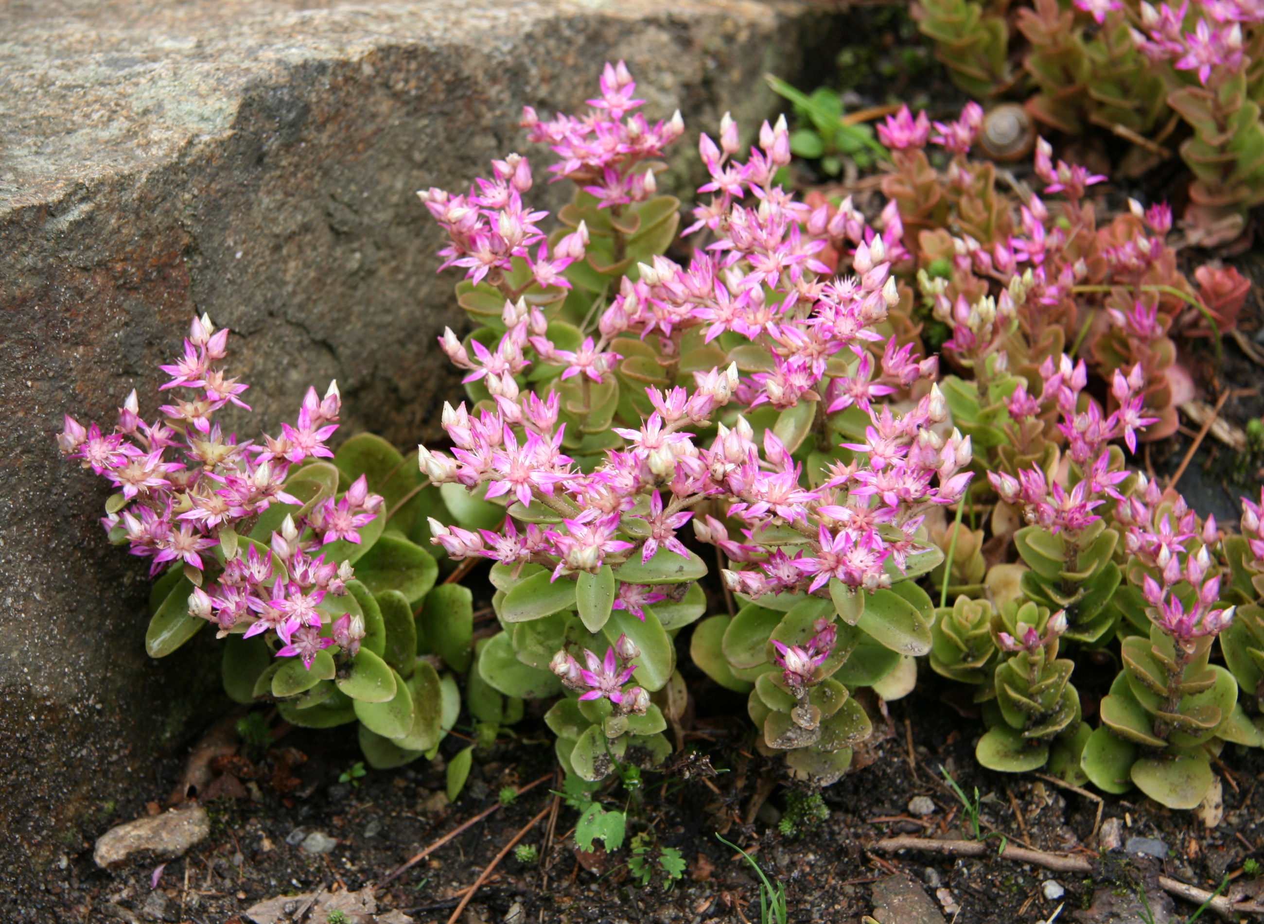 Phedimus obtusifolius im Botanischen Garten Dresden